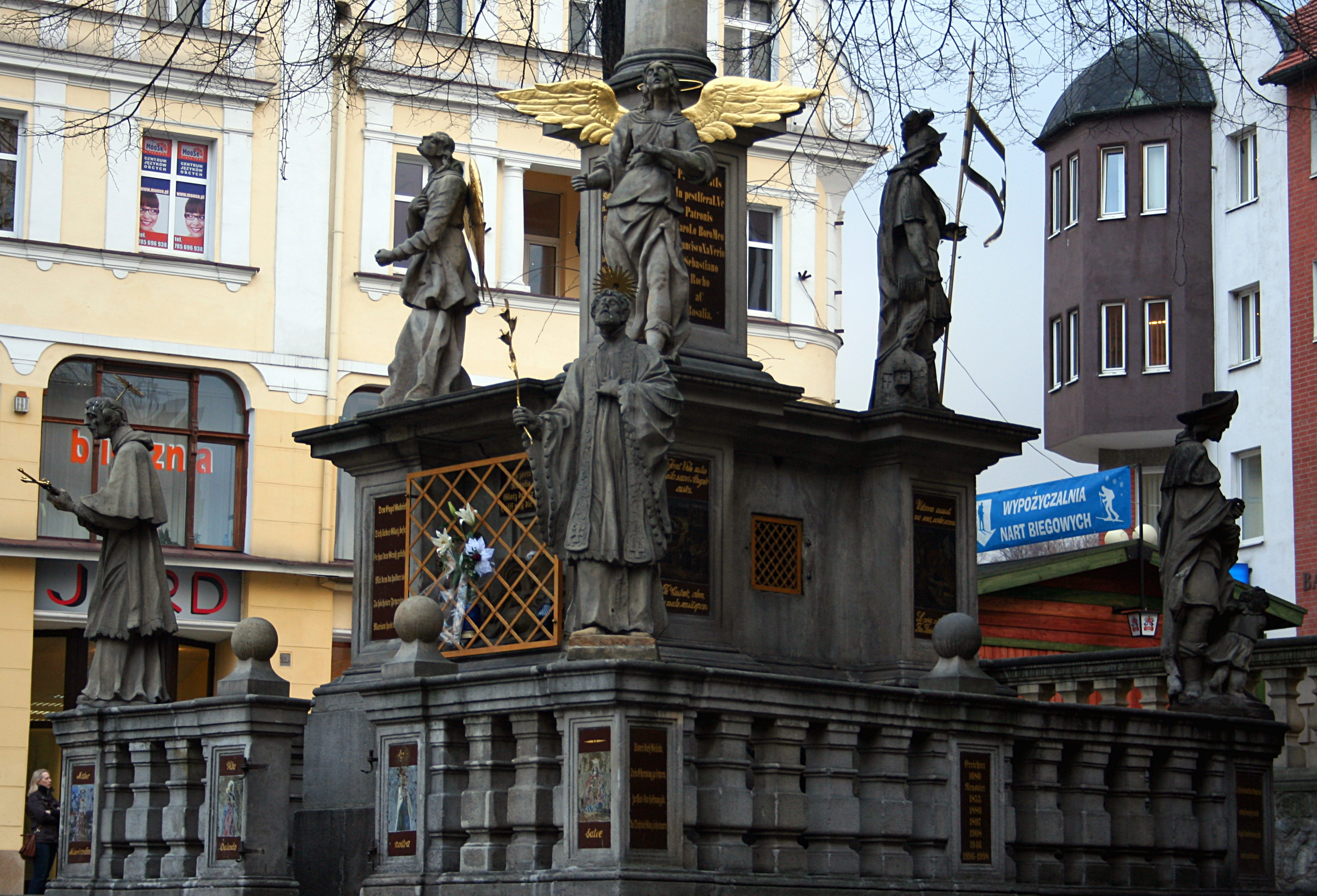 Podstawa zabytkowej kolumny NMP na rynku w Kłodzku.